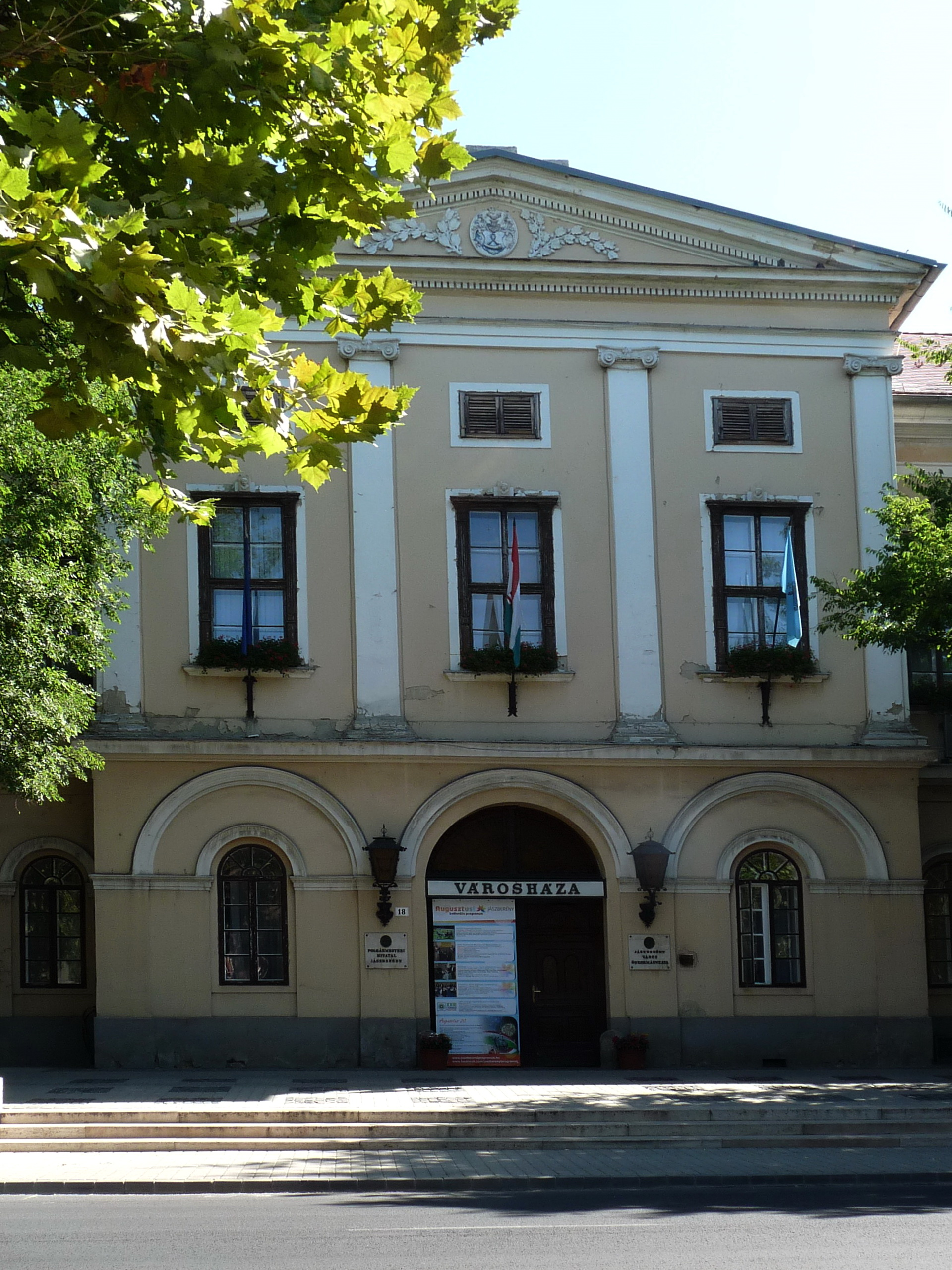 Pollack Mihály tervei alapján, Bedekovich Lőrinc végső terveit figyelembe véve építették klasszicista stílusban, 1839-ben, majd 1912-13-ban, végül 1931-ben bővítették új szárnyakkal. This is a photo of a monument in Hungary, Identifier: 5929